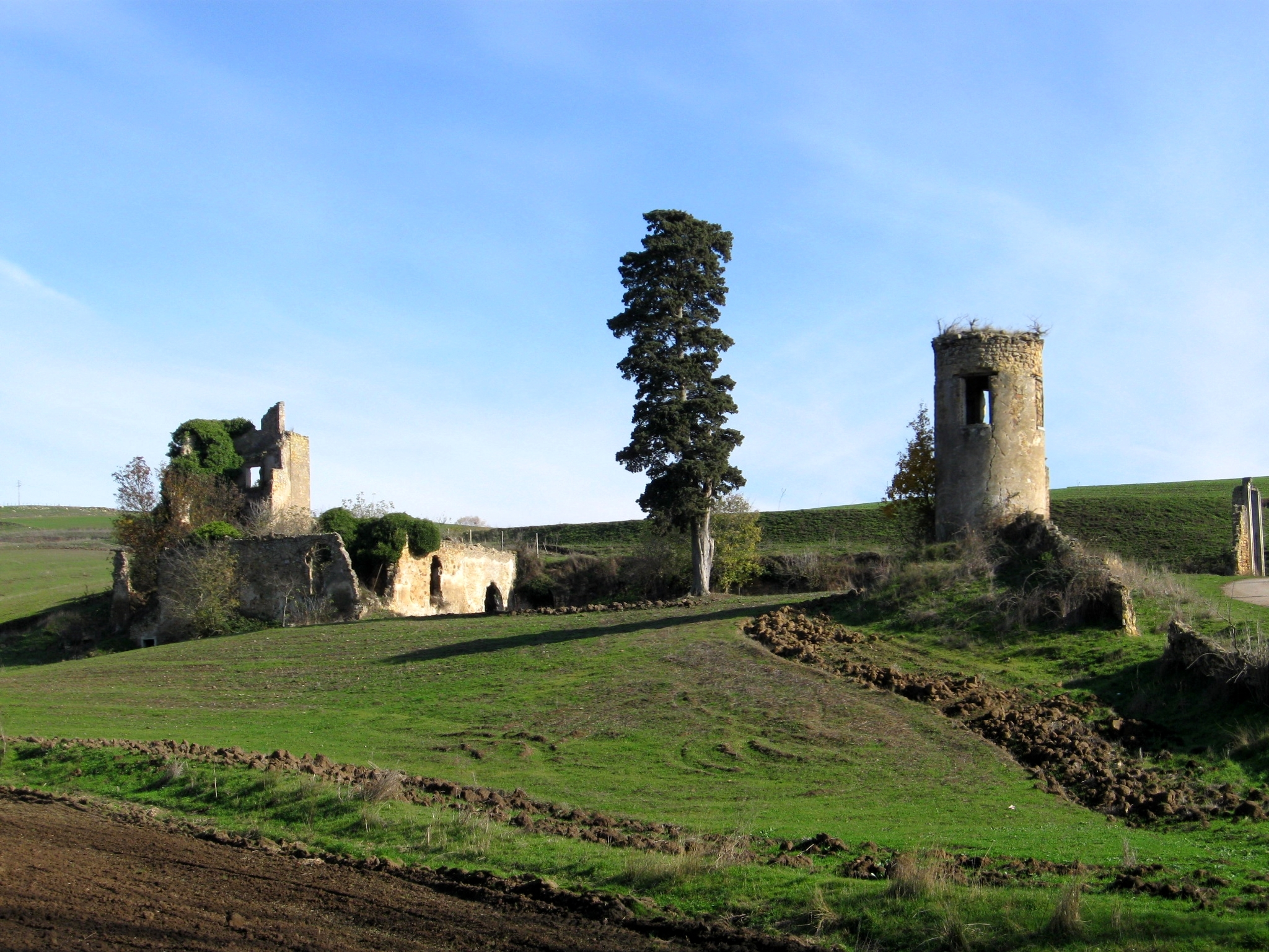 Resti di una villa romana a Rionero in Vulture (Basilicata)